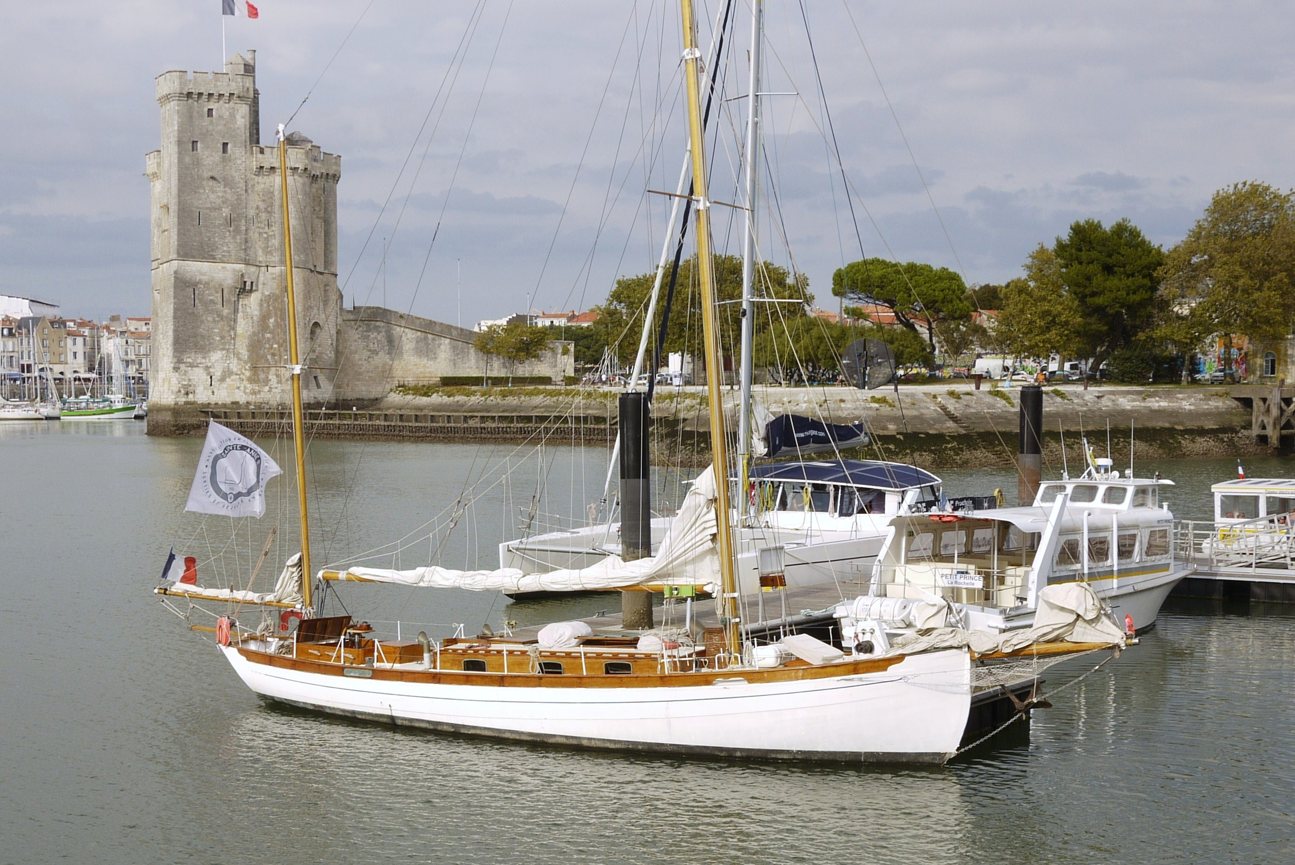 Le yawl « SAINTE-ANNE III » amarré dans l’avant-port de La Rochelle. Ce voilier de plaisance (yawl marconi) a été construit en 1933 dans les Chantiers Auroux à Arcachon. Il mesure 19,42 mètres de long (LHT) et 4,10 mètres de large. Voilier construit en teck. Yacht agréé au Musée maritime de La Rochelle. Utilisé pour effectuer des sorties en mer payantes. La Rochelle, Charente-Maritime, France.